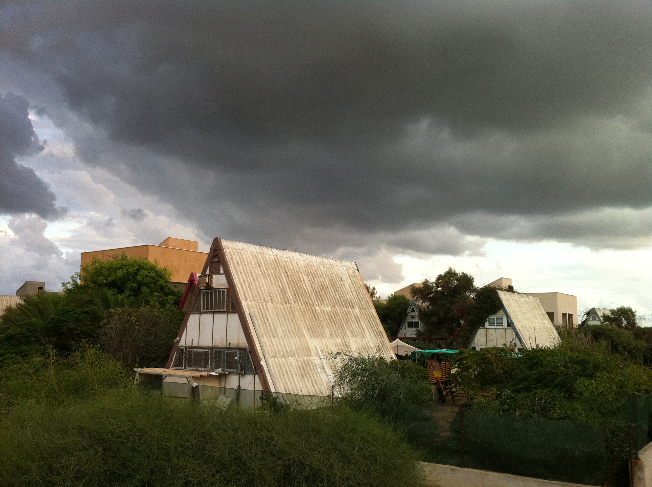 משולשים כפי שניו פעם